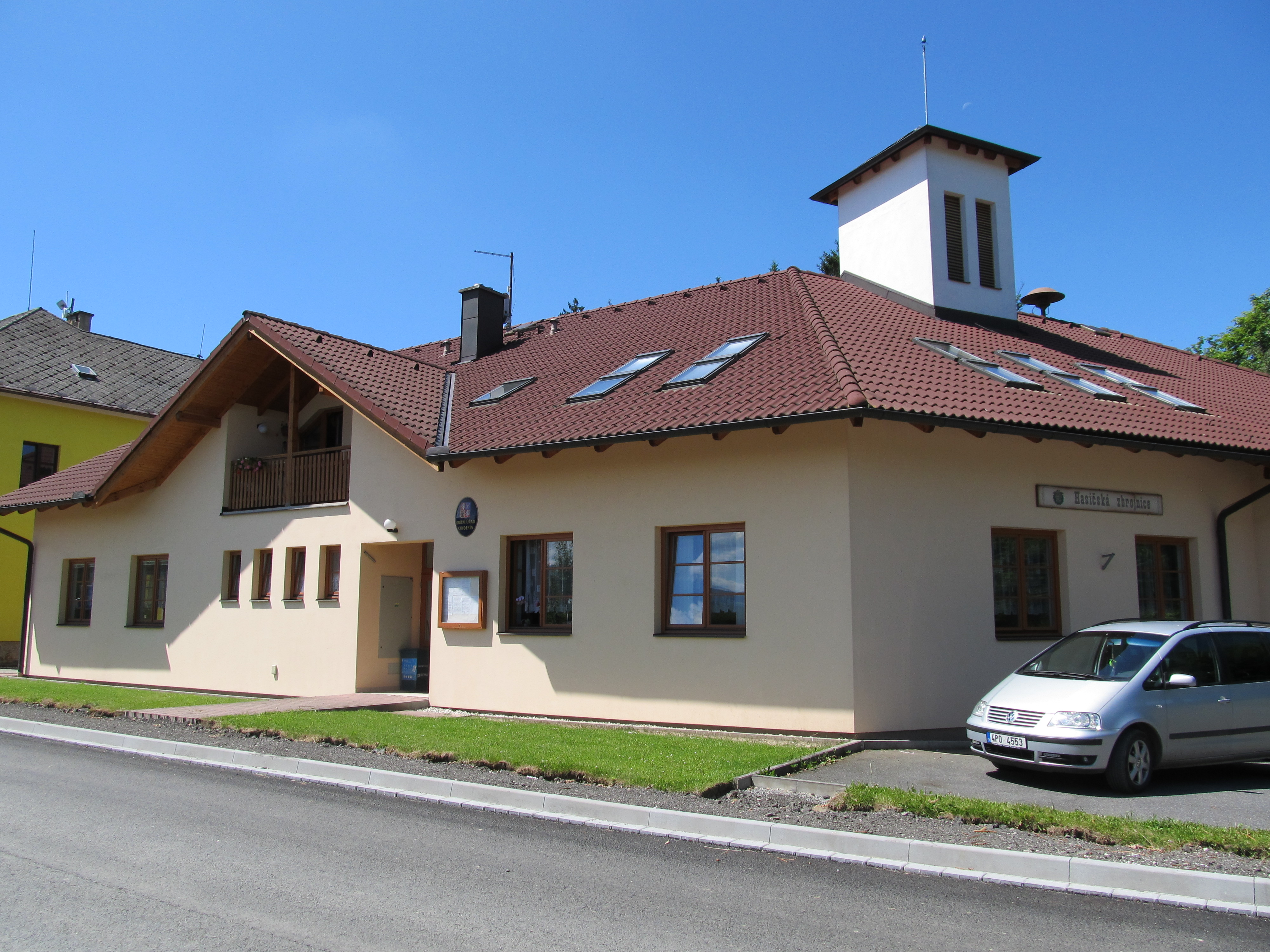 Chudenín - OÚ s hasičárnou